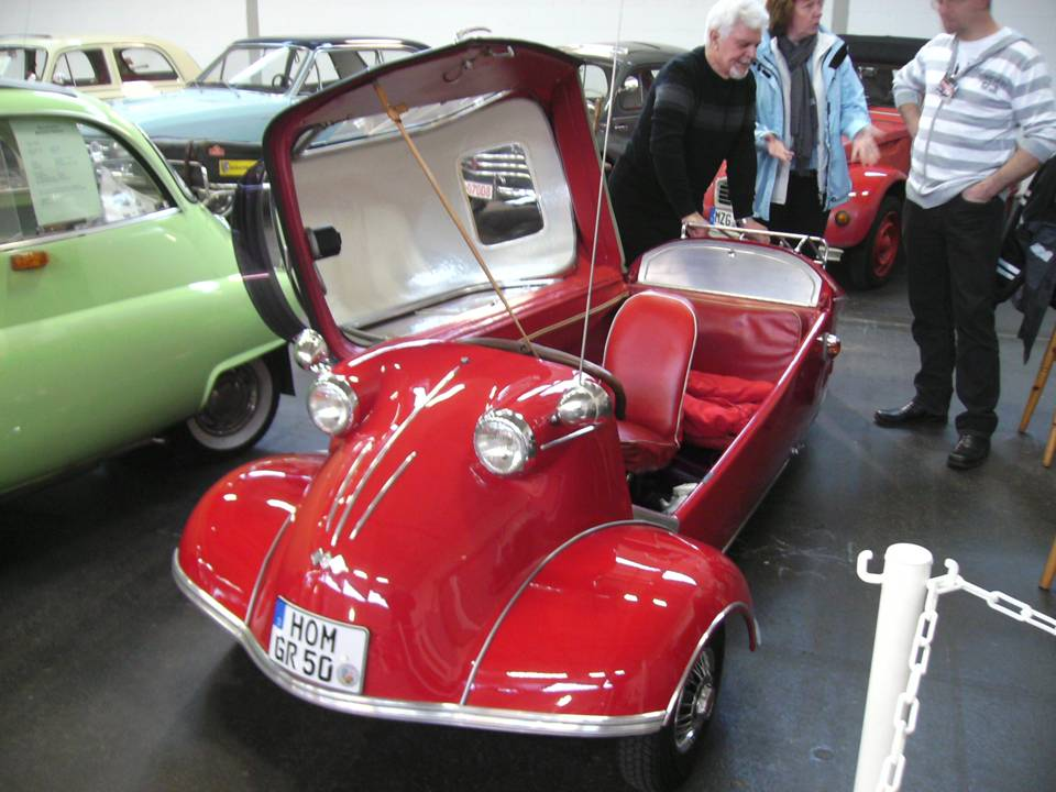 Messerschmitt Kabinenroller KR 200 (aufgeklappt)